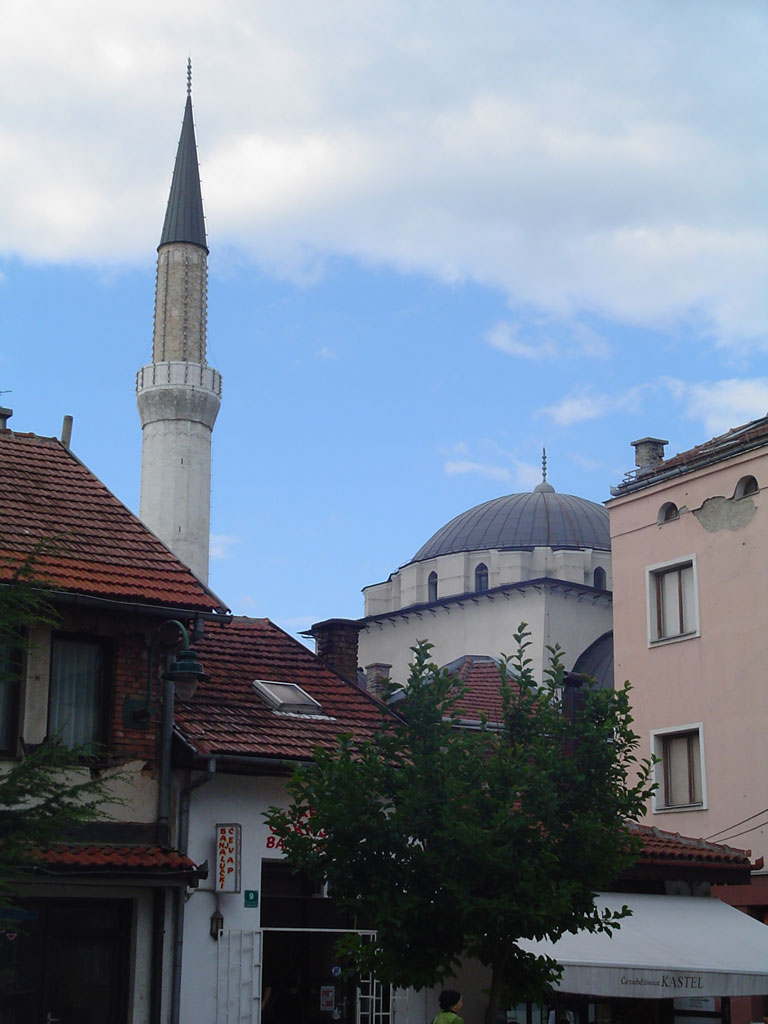 Photo de la mosquée Gazi Husrev Begova à Sarajevo Cette photographie a été prise par mes soins.